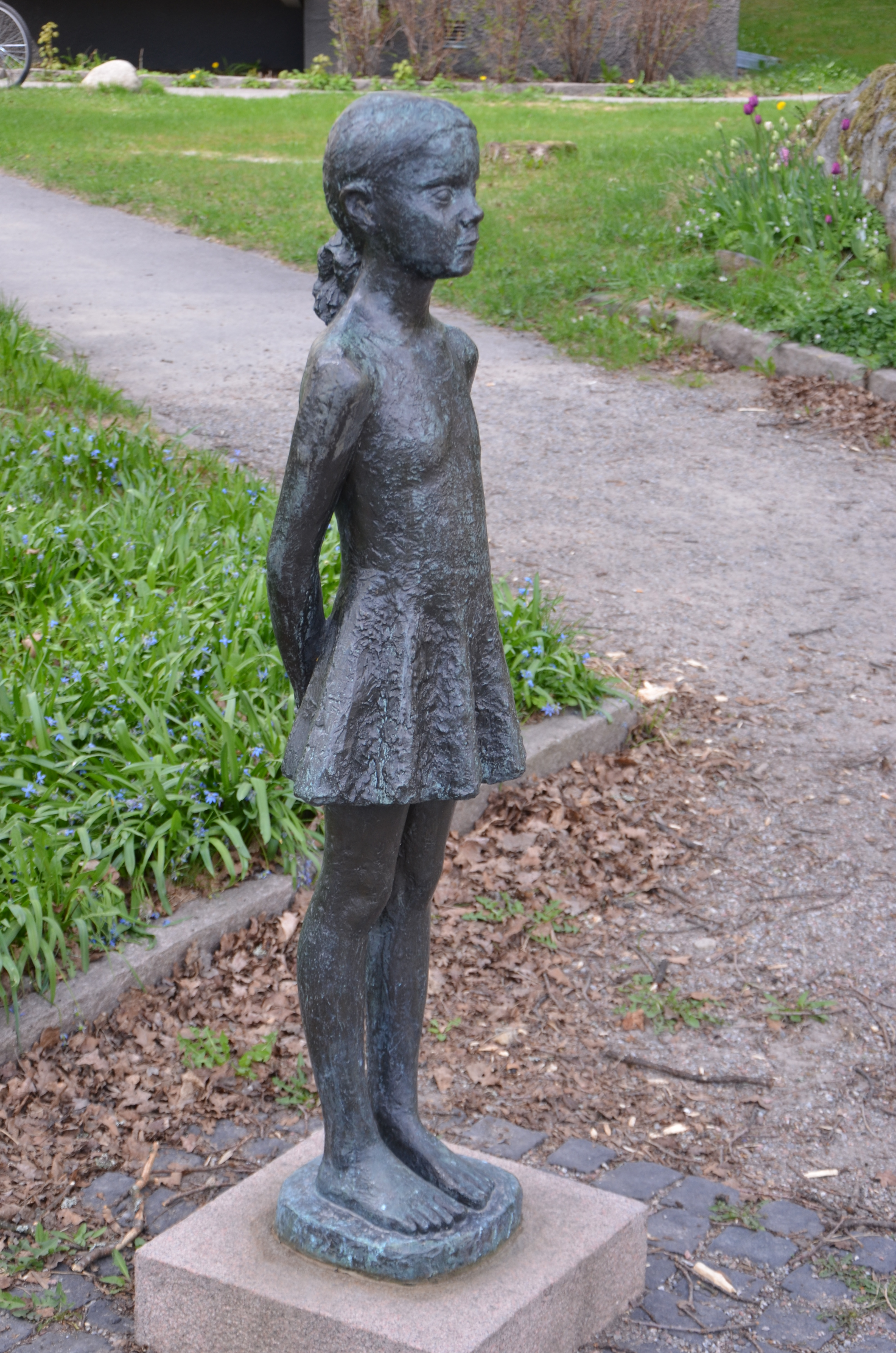 Sten Ericson's / år (Seven years old), bronze, Sköndalsvägen 124-126, Stockholm